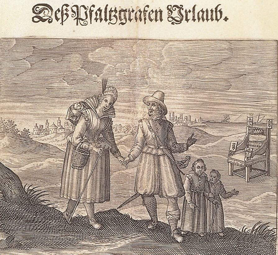 Spottschrift auf den Kurfürsten Friedrich V. von der Pfalz